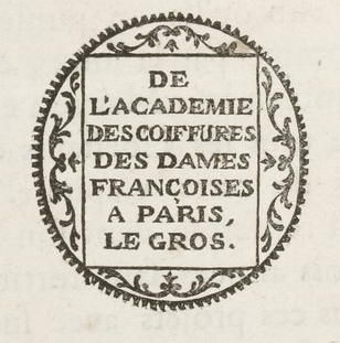 Versandsiegel (cachet).